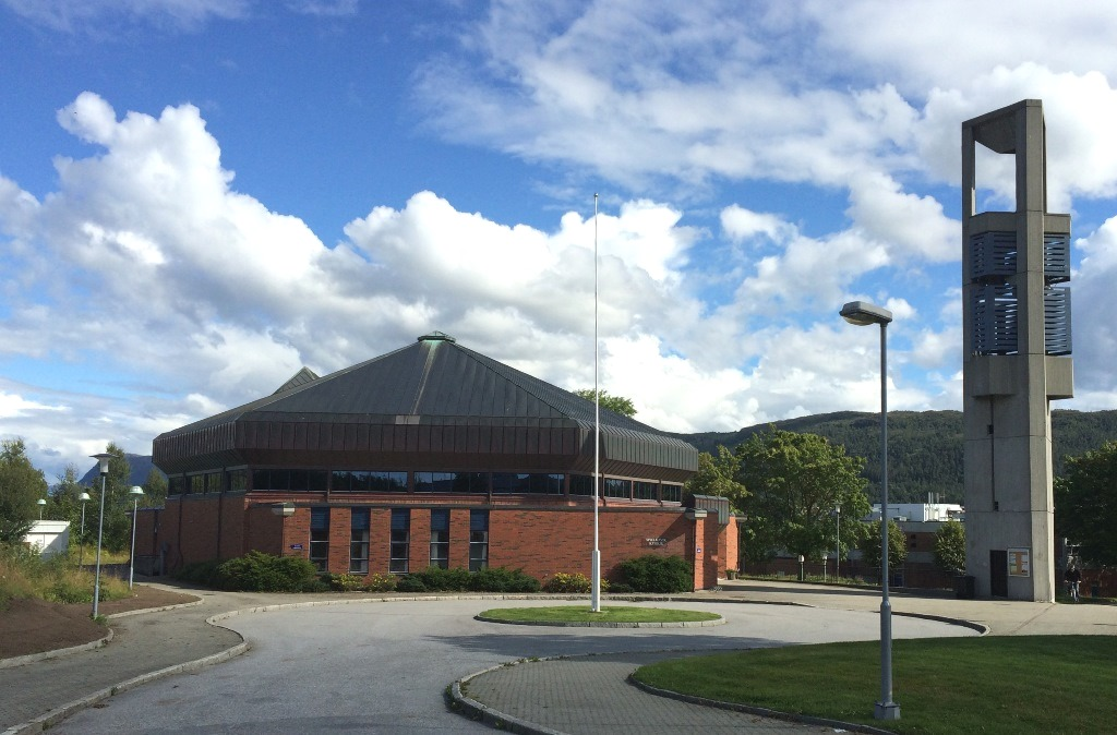 Spjelkavik kirke